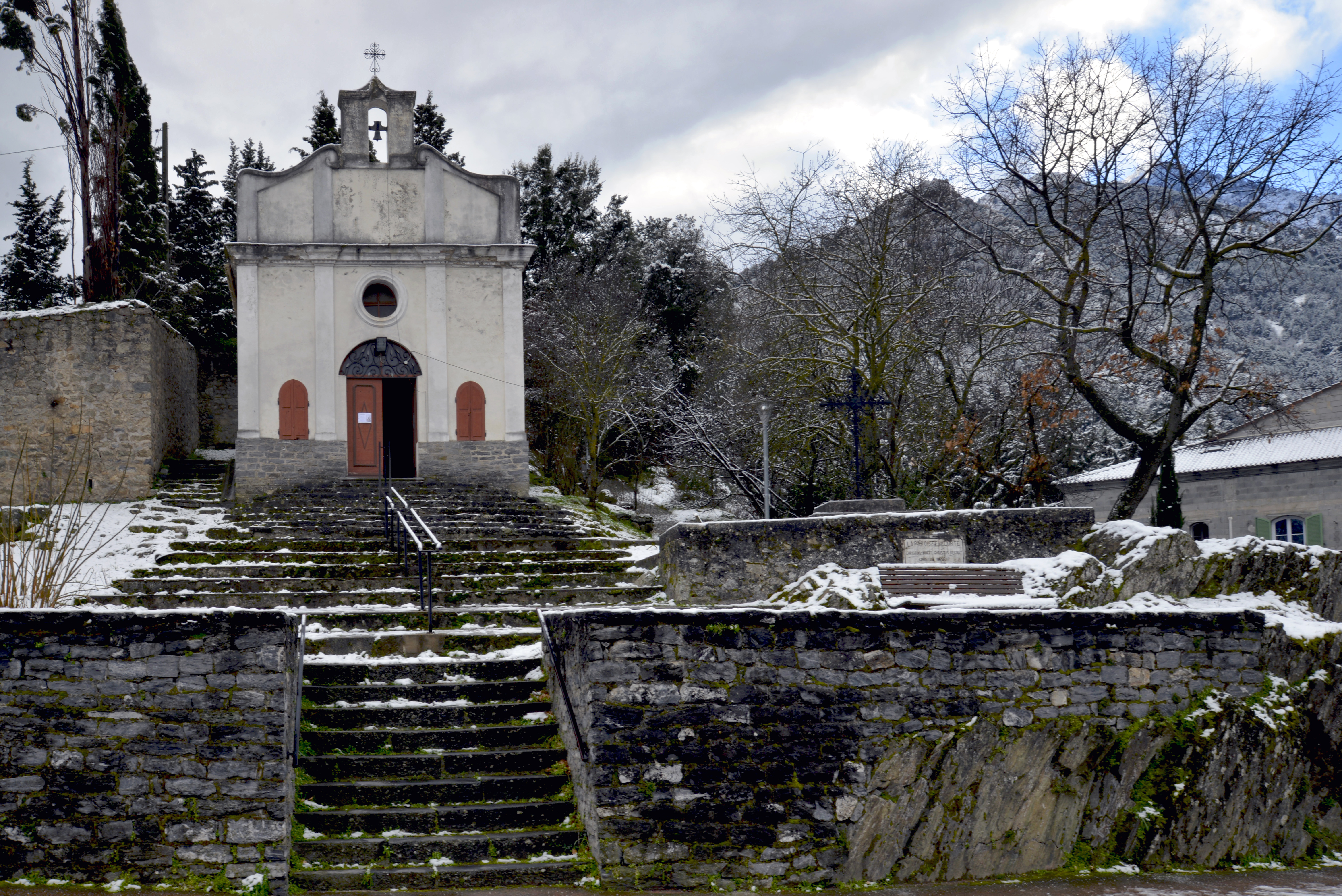 Corte, Centre Corse (France) - Chapelle Saint-Antoine de Padoue, faubourg Saint-Antoine